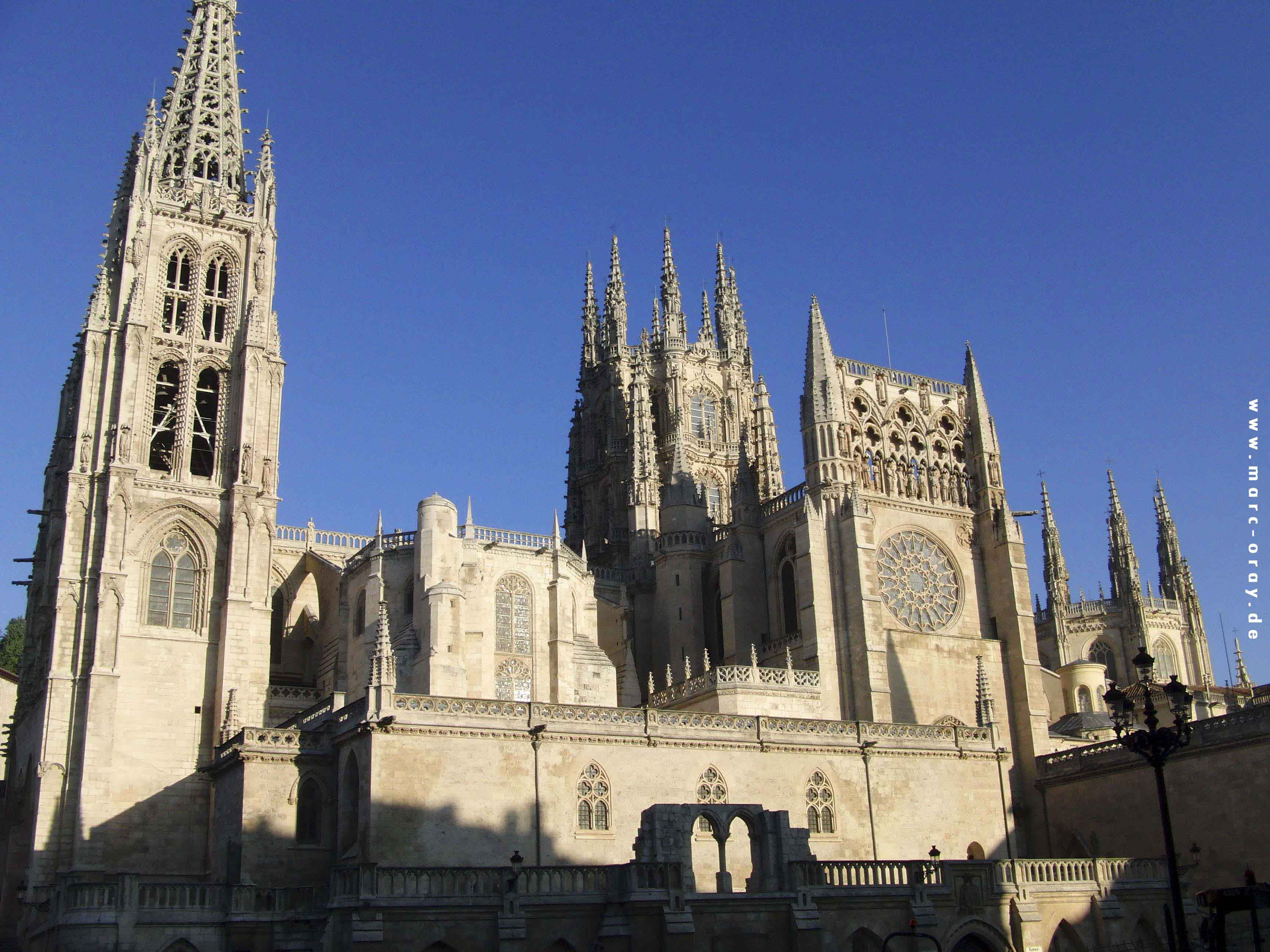 Burgos Kathedrale